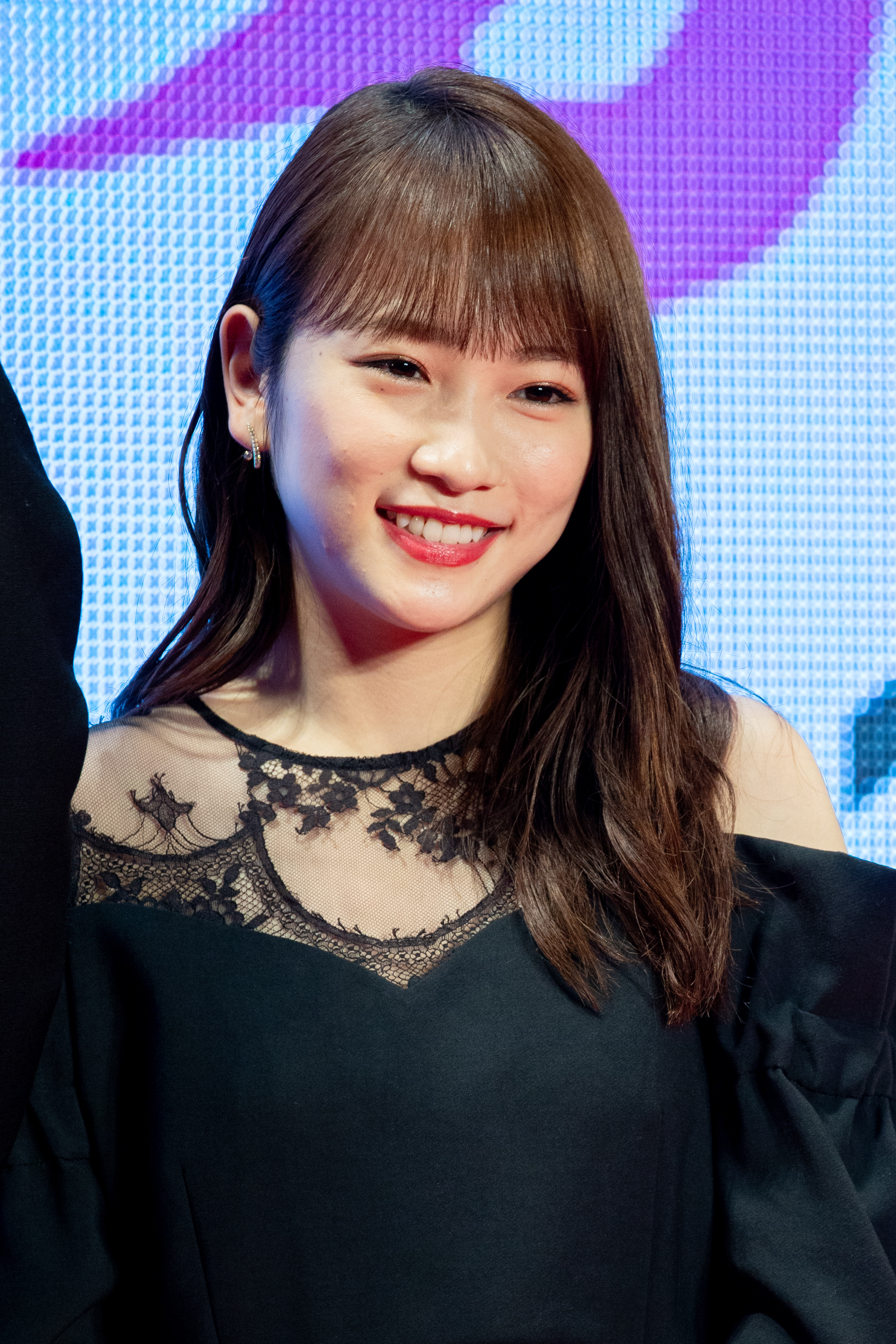 第30回 東京国際映画祭 人魚の眠る家 レッドカーペットイベント 川栄李奈